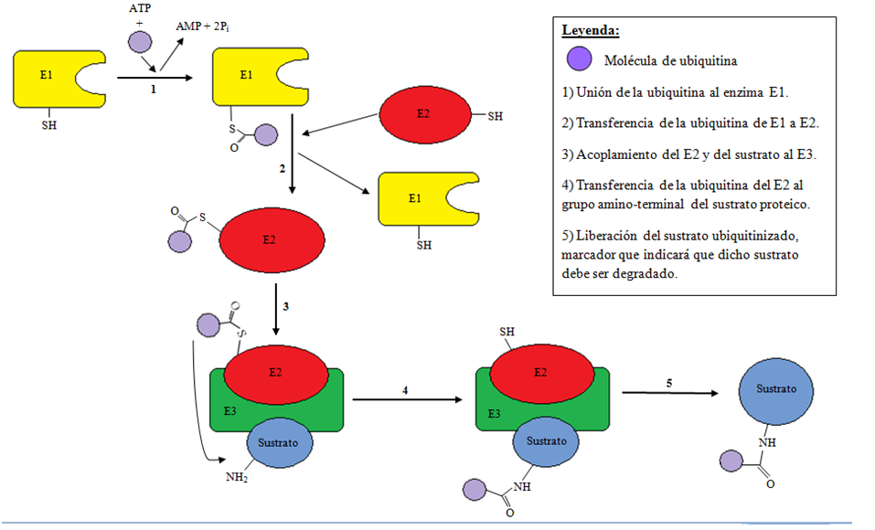 Esquema del Proceso de monoubiquitinización de las proteínas